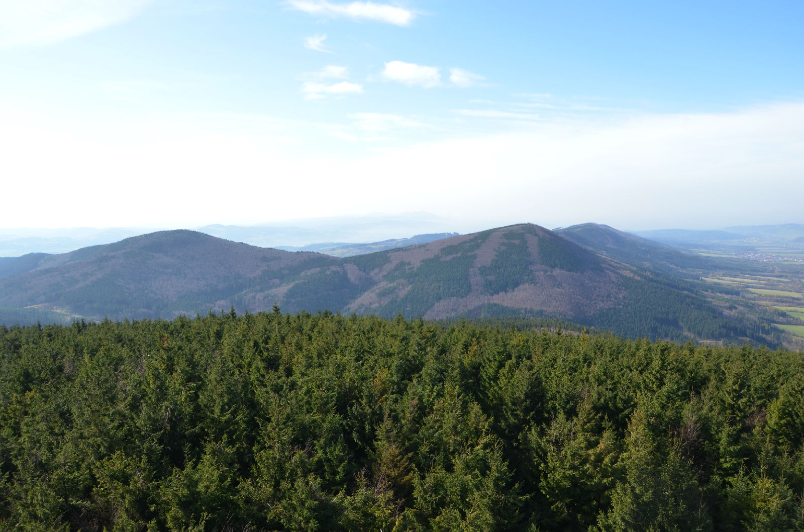 Pohled z Javorníku na Veřivické Vrchy